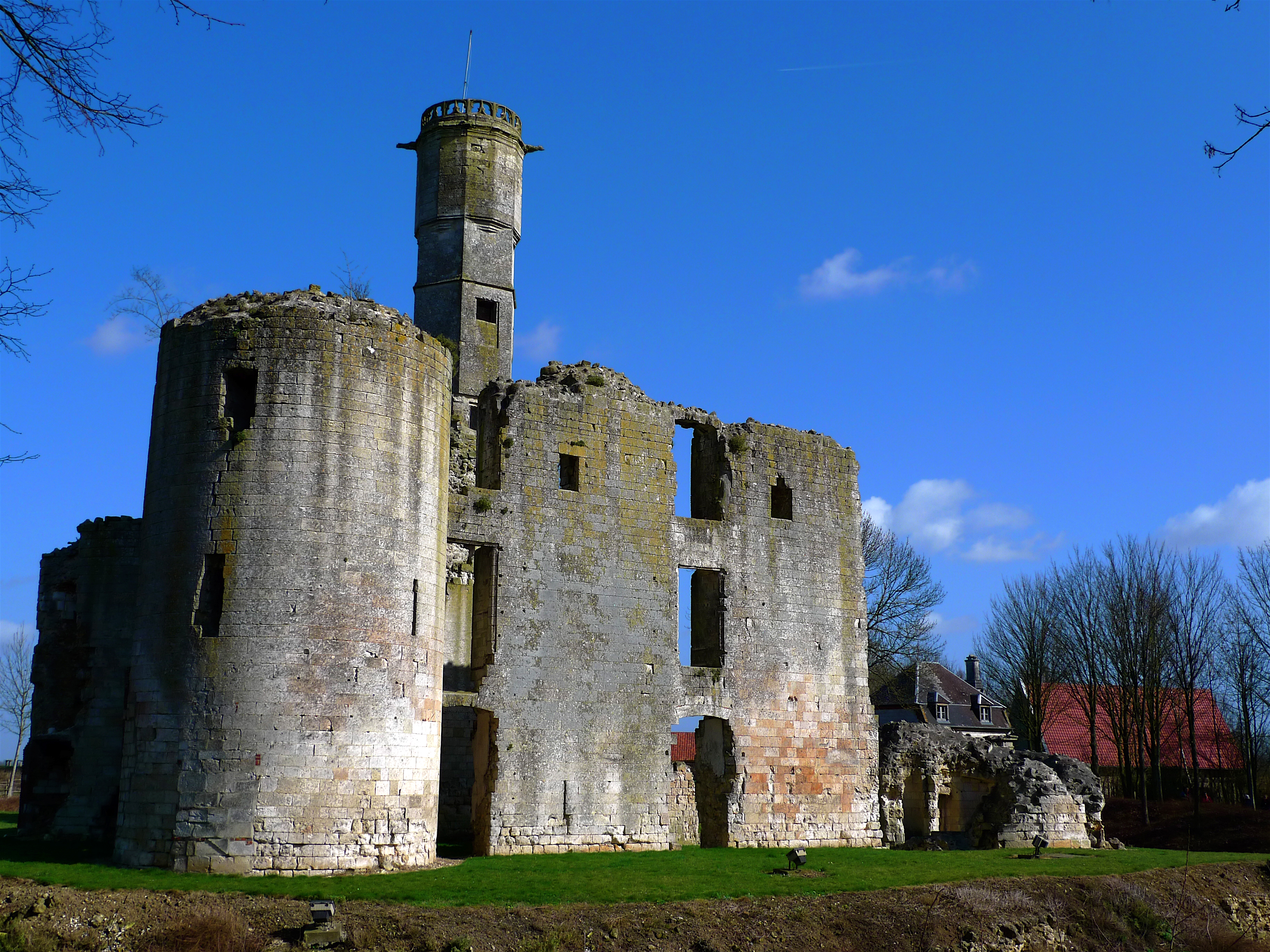 Folleville (Somme, France) - Le château. . .